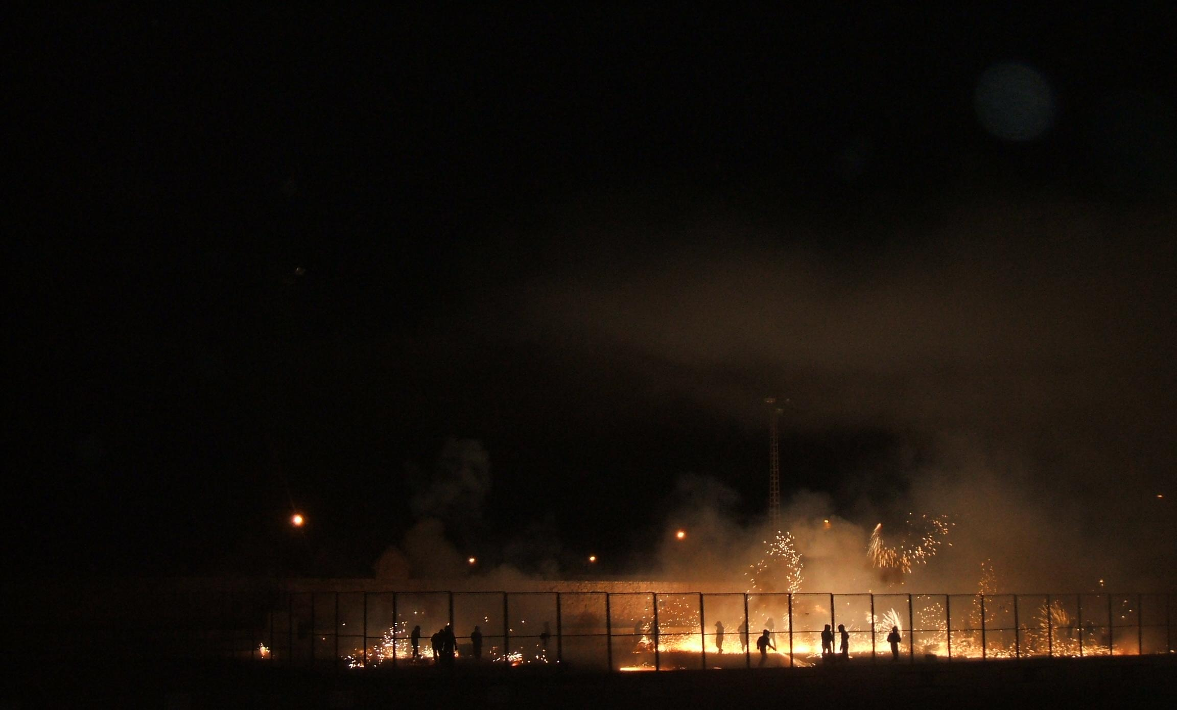 Recinto donde se limitan las cordadas